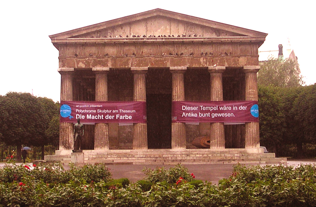 ART POSITION im Theseus Tempel des Kunsthistorischen Museums